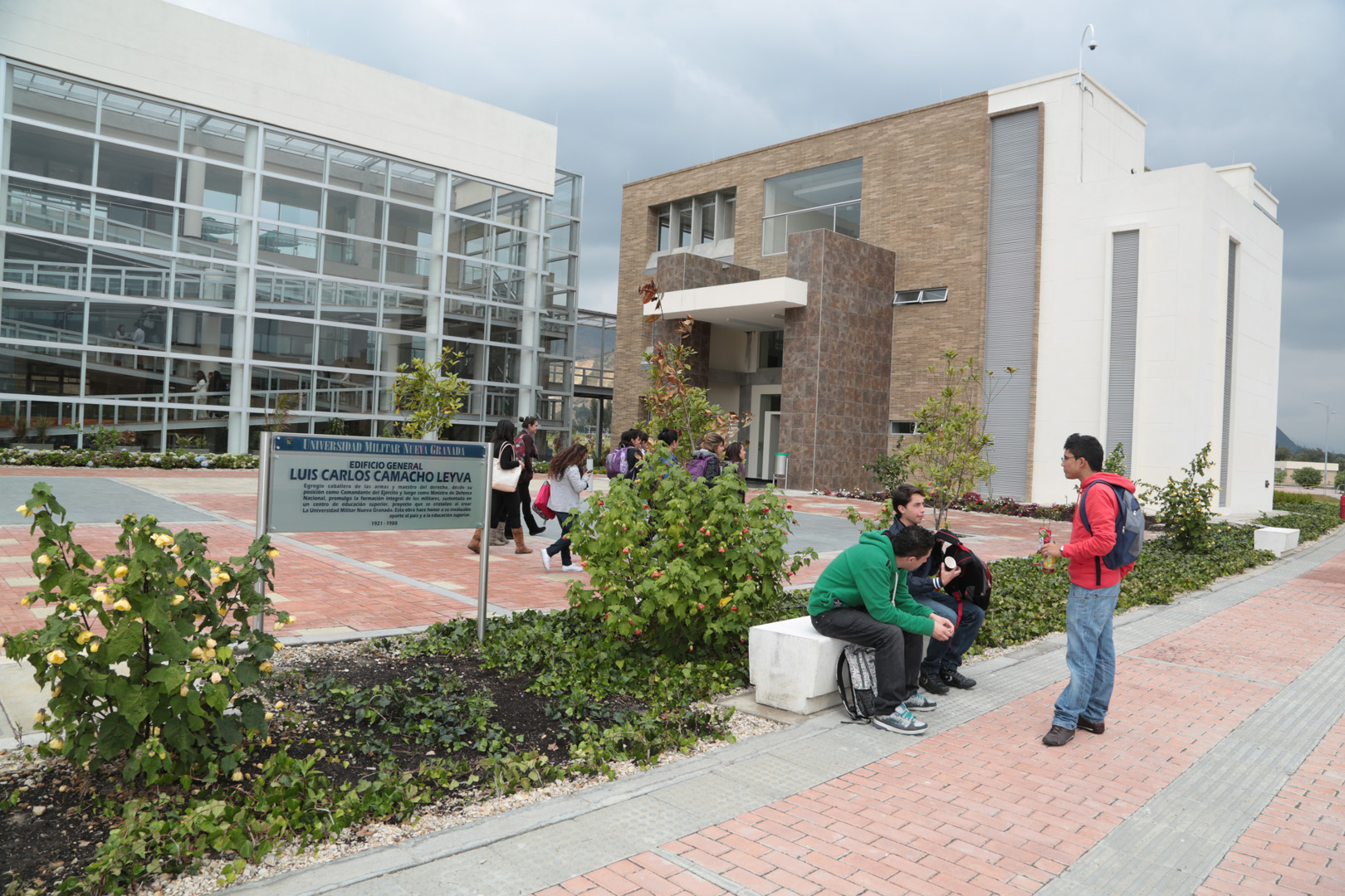 UMNG Campus Nueva Granada - Edificio Luis Carlos Macho Leyva